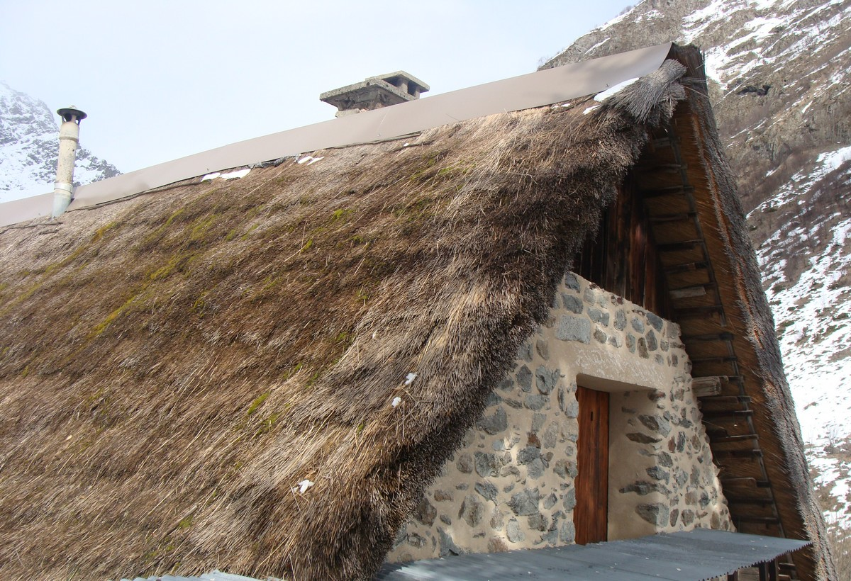 Toit en chaume de construction récente, au hameau de Portes (vallée de la Navette).